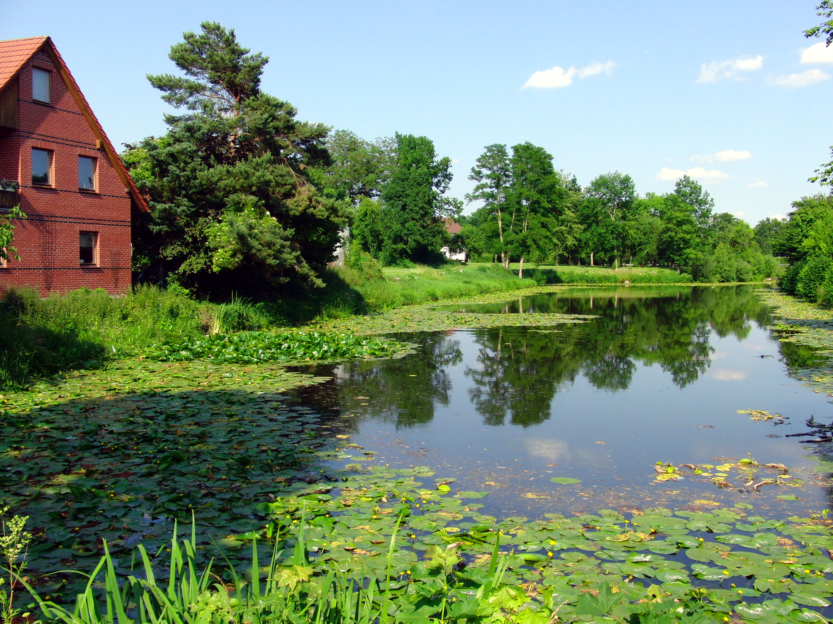 Der Wallgraben in Ziegenhain(Nordhessen)